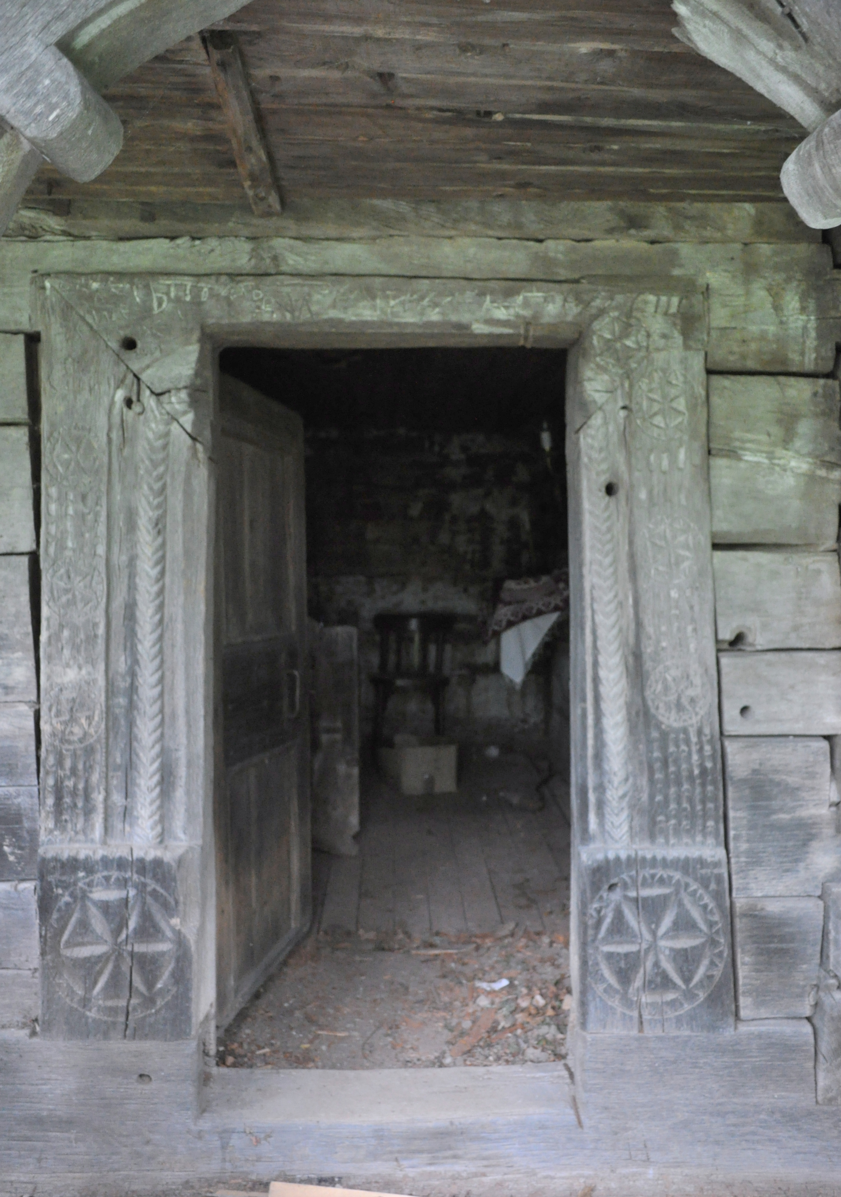 Biserica Sfinţii Arhangheli, Sat Brusturi, Comuna Creaca, județul Sălaj